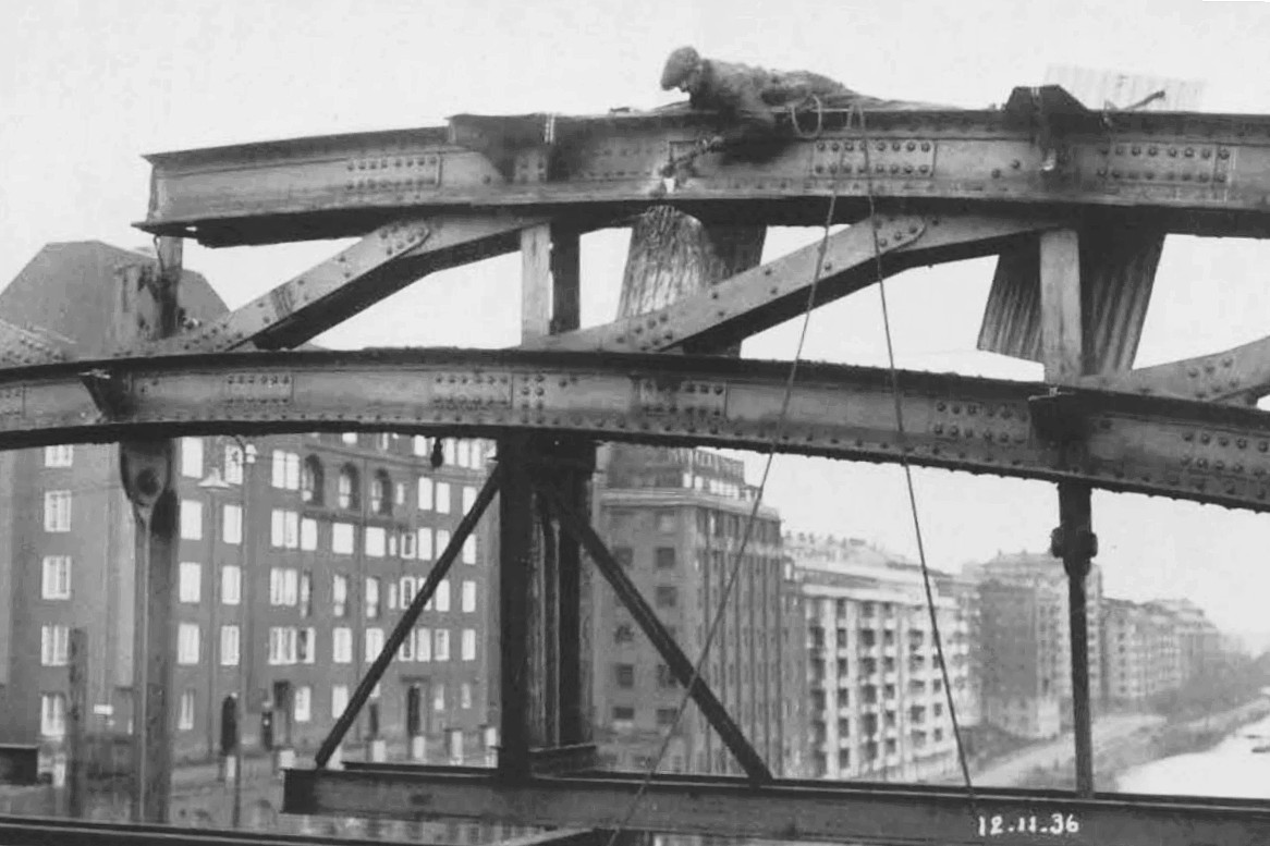 Ombyggnad av gamla S:t Eriksbron